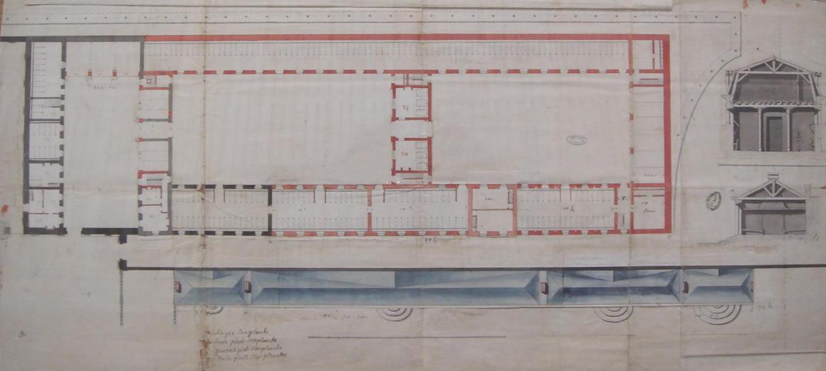 Plan des agrandissements du chenil, avec création des écuries, Jules Hardouin-Mansart, 1701.